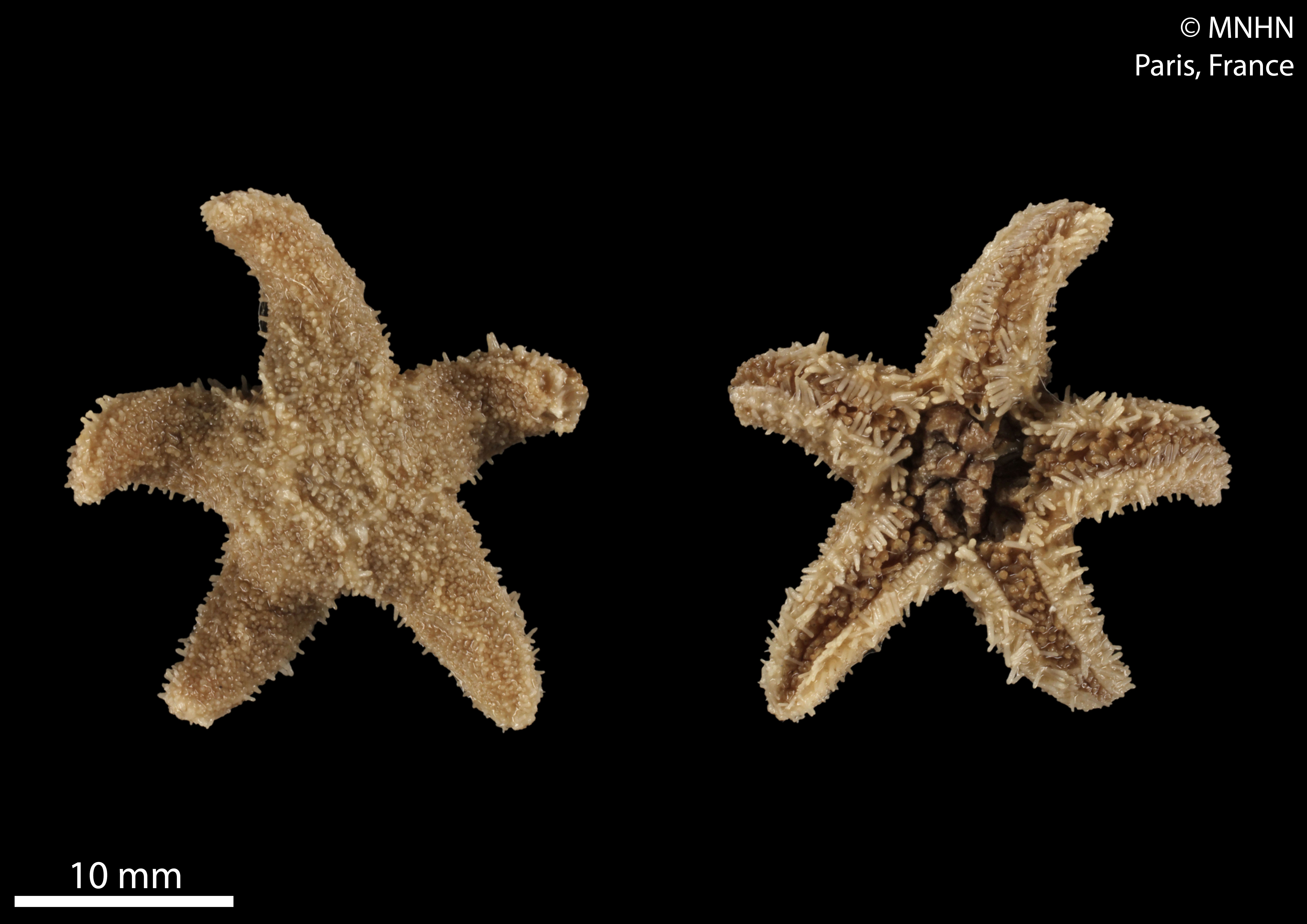 Anasterias antarcticaSpécimen MNHN-IE-2014-612, sous la dénomination Asterias hyadesi Perrier, 1886Collection : Échinodermes (IE)Muséum National d'Histoire Naturelle (Paris, France) Origine : Localité/Lieu-dit : Canal Franklin Expédition : Mission du Cap Horn 1882-1883 Navire : La Romanche Numéro de station : 170 Date de récolte : 1883-06-27 Profondeur (mètres) : 95